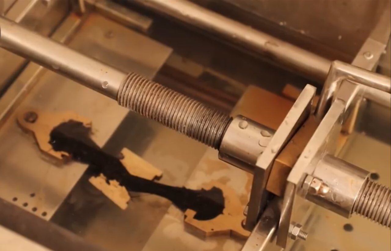 نمونه تست شکل پذیری